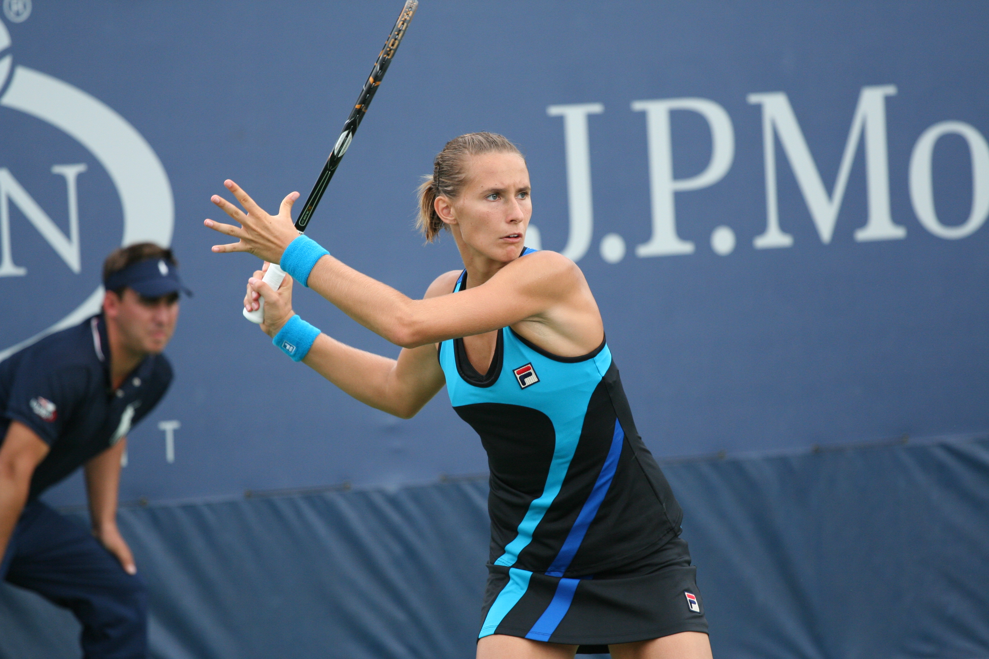 U.S. Open Sept. 3, 2010